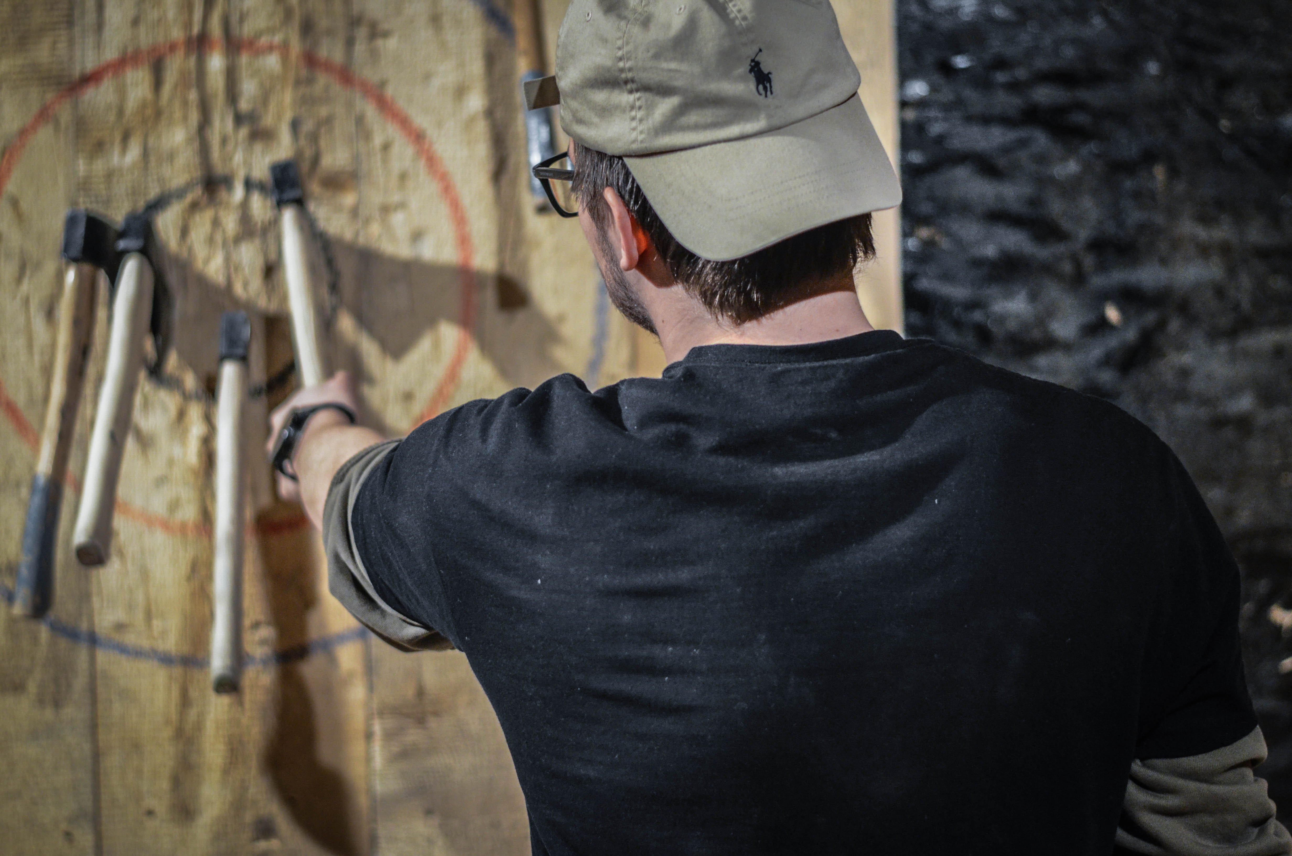 Rzucanie siekierami Polska, Kraków